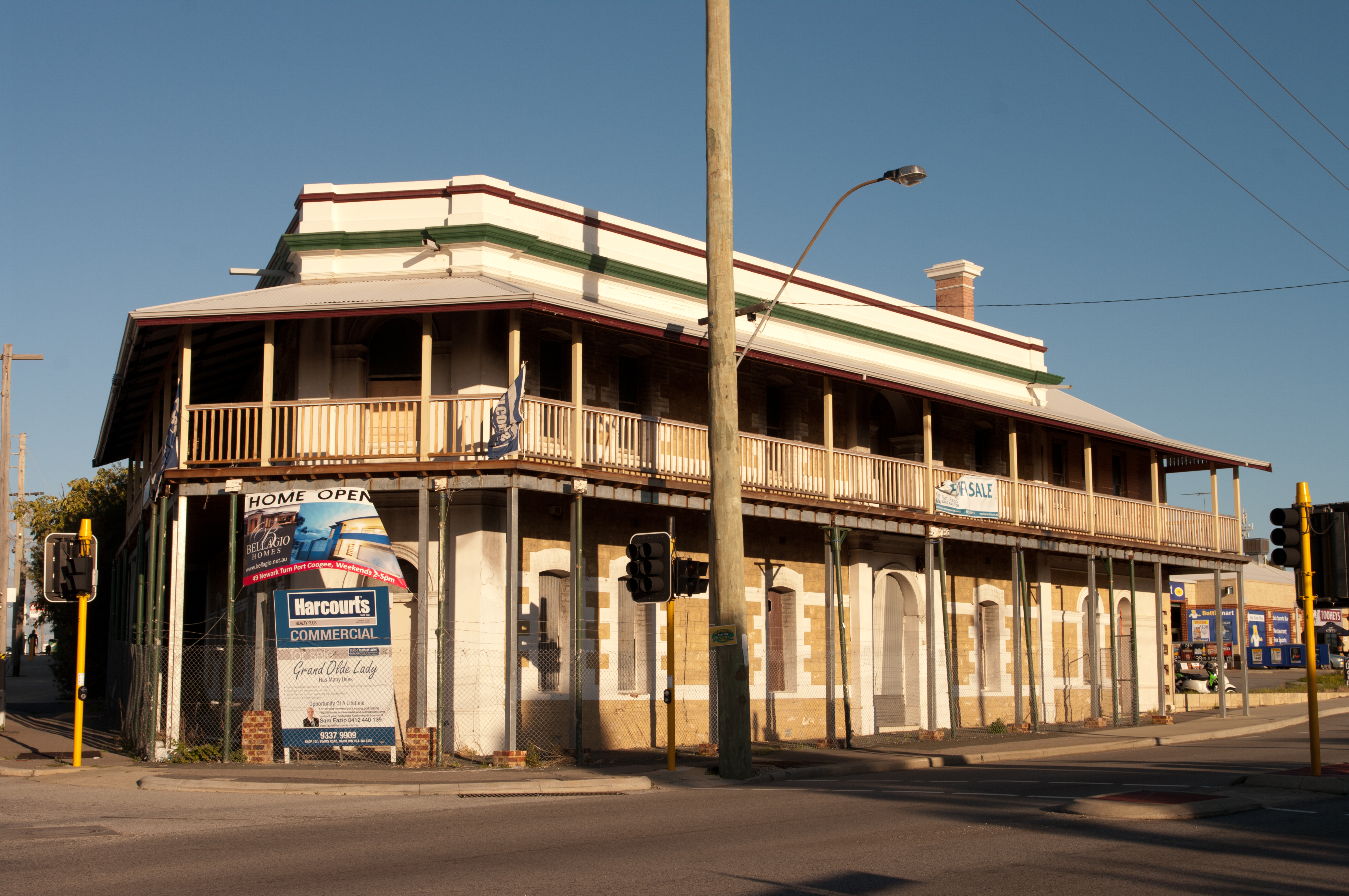 Newmarket hotel